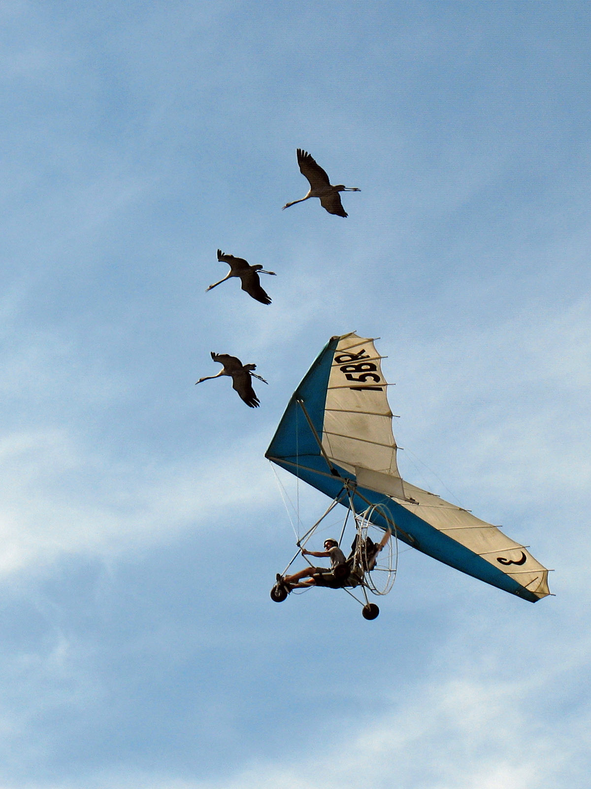 Vol en patrouille avec des grues cendrées. Auteur: Monster1000 France août 2006